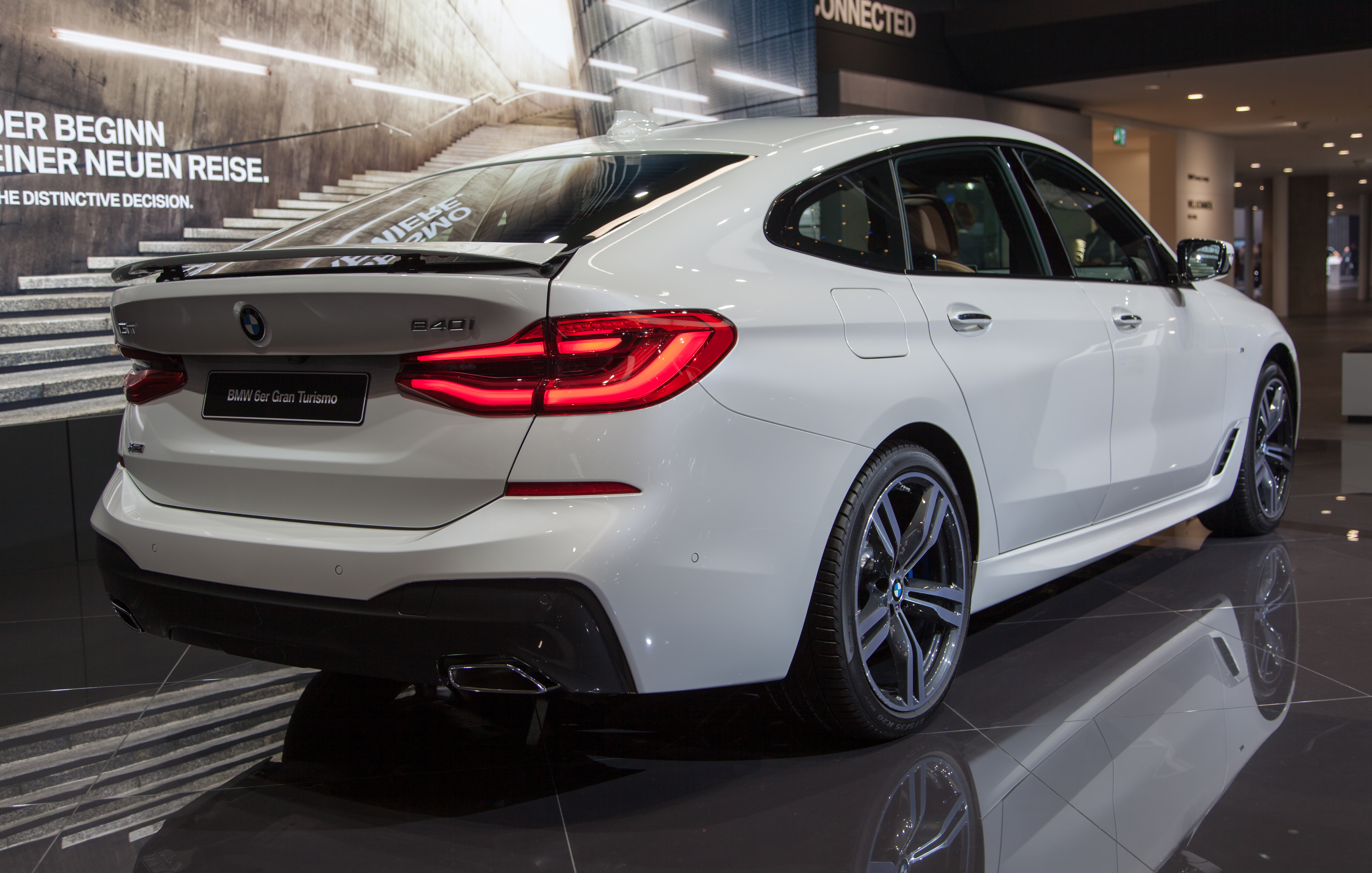 BMW 6er Gran Turismmo auf der IAA 2017